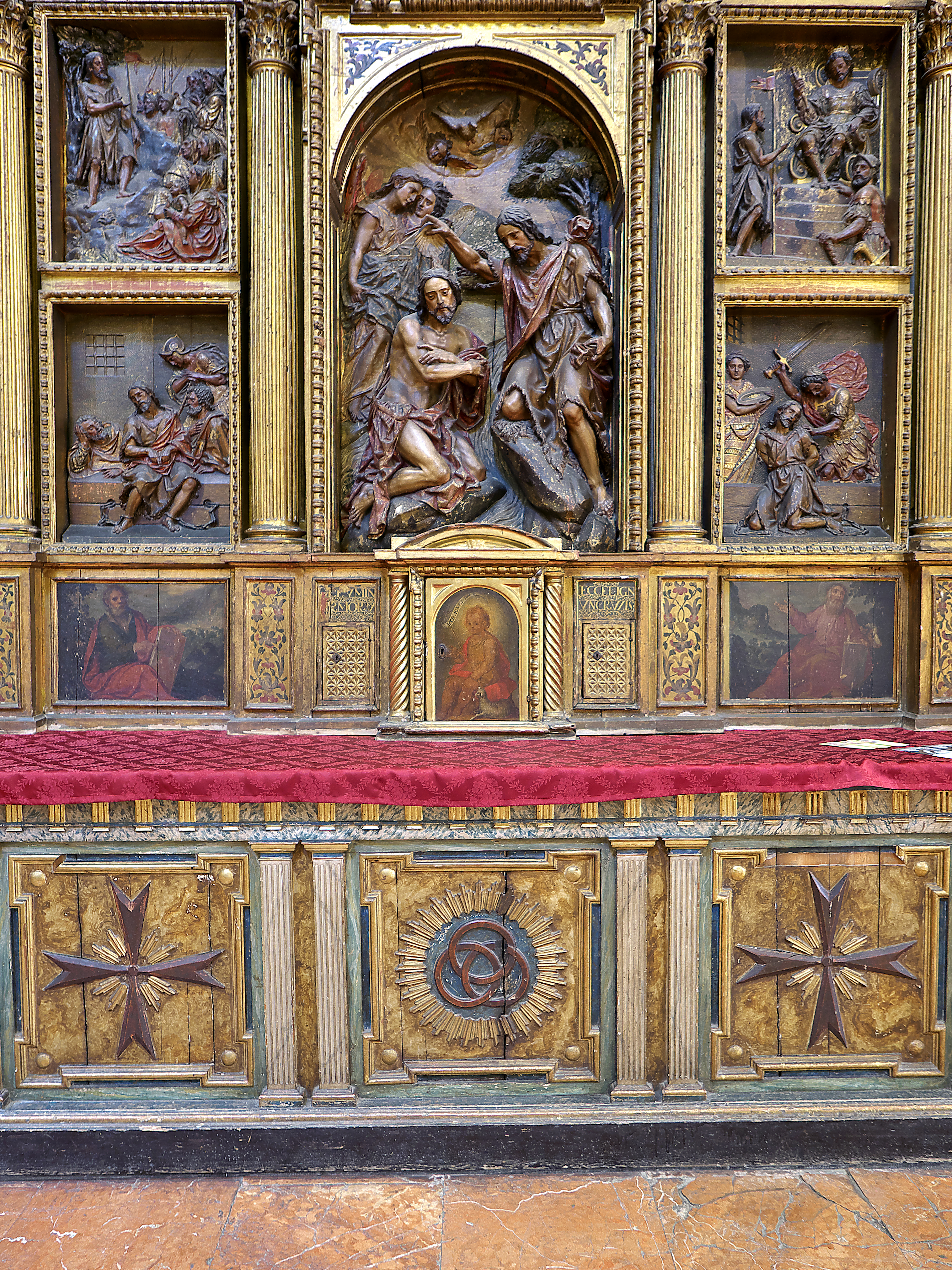 Realizado por Juan Martínez Montañés (1610) para el Monasterio de Santa María del Socorro, Sevilla. La policromía y pinturas son de Juan de Uceda